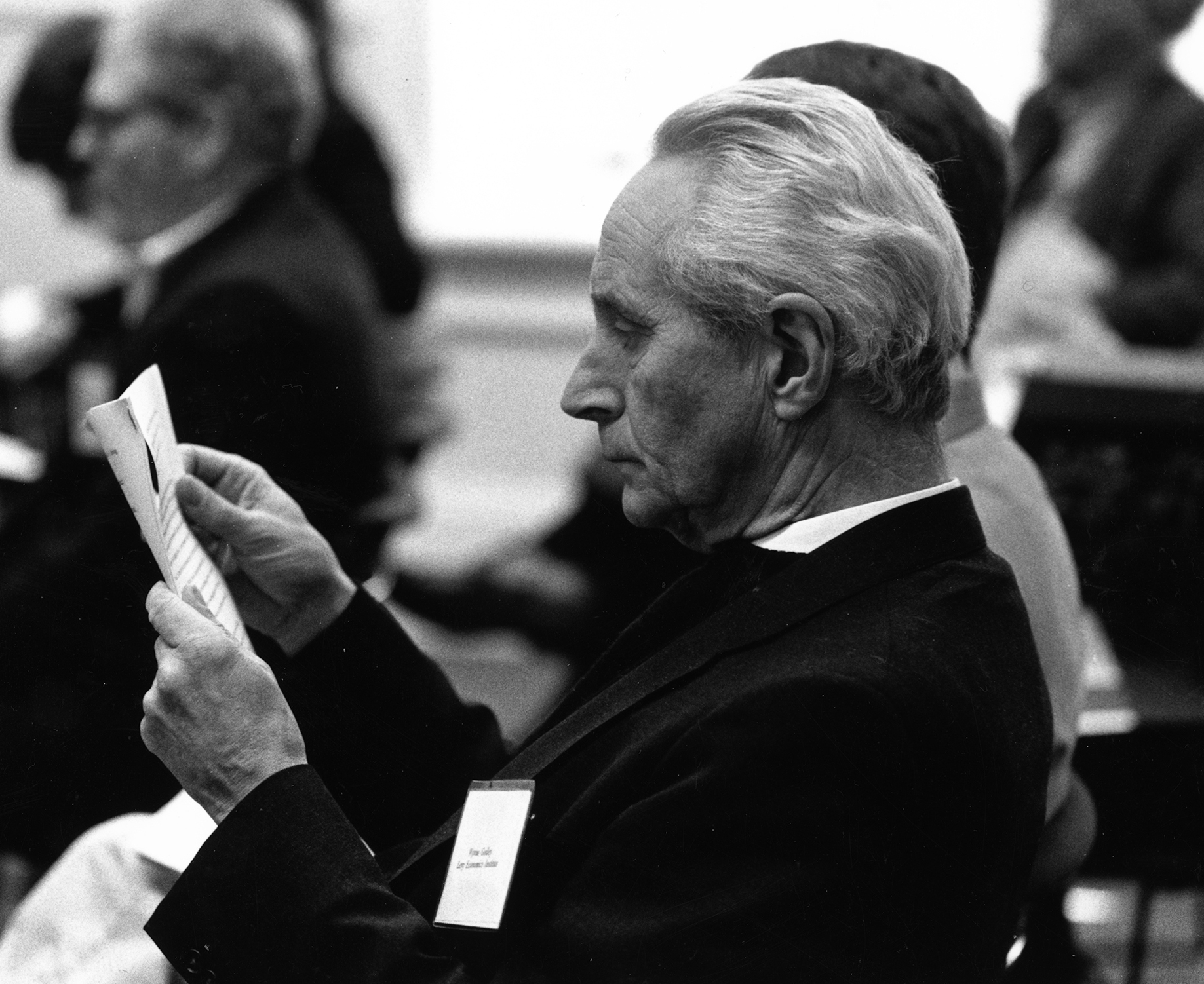 Fotografía del economista británico Wynne Godley